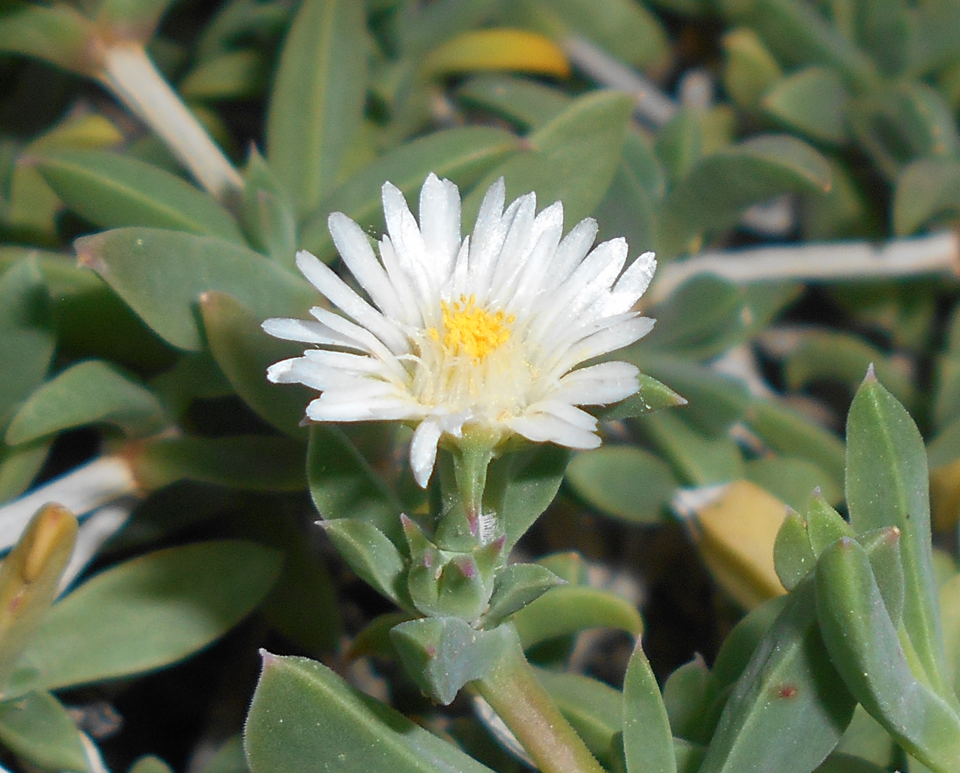 Delosperma litorale, Botanischer Garten Berlin.